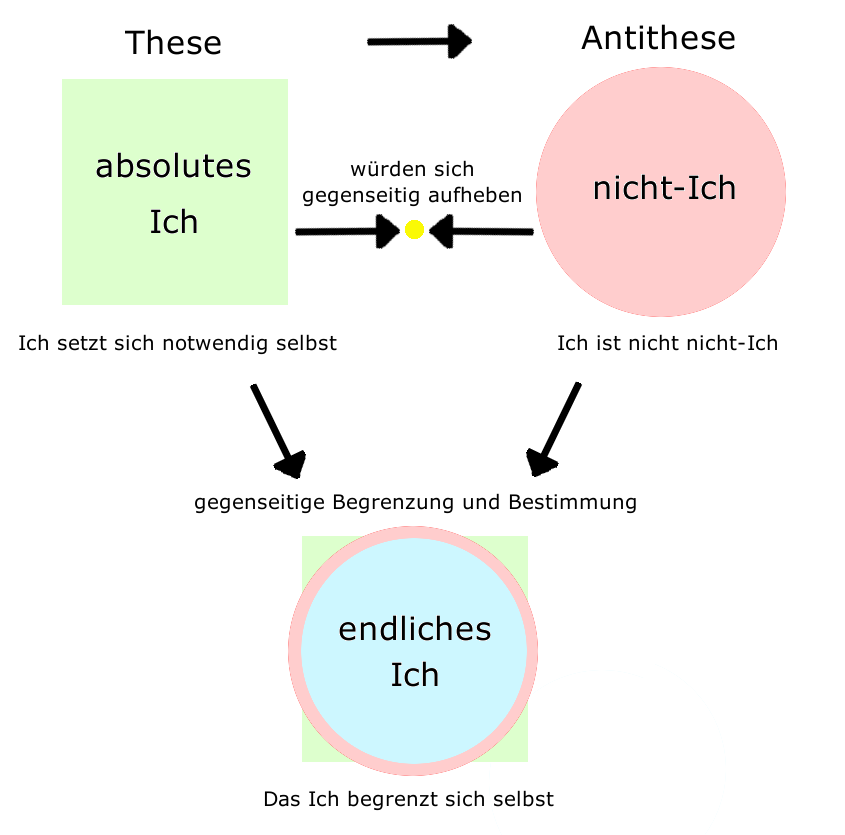 Schema zu Fichtes Metaphysik. Diagram of Fichte's metaphysics.